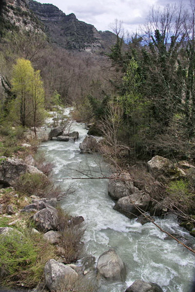 Particolare del fiume Vomano il 17 aprile 2005